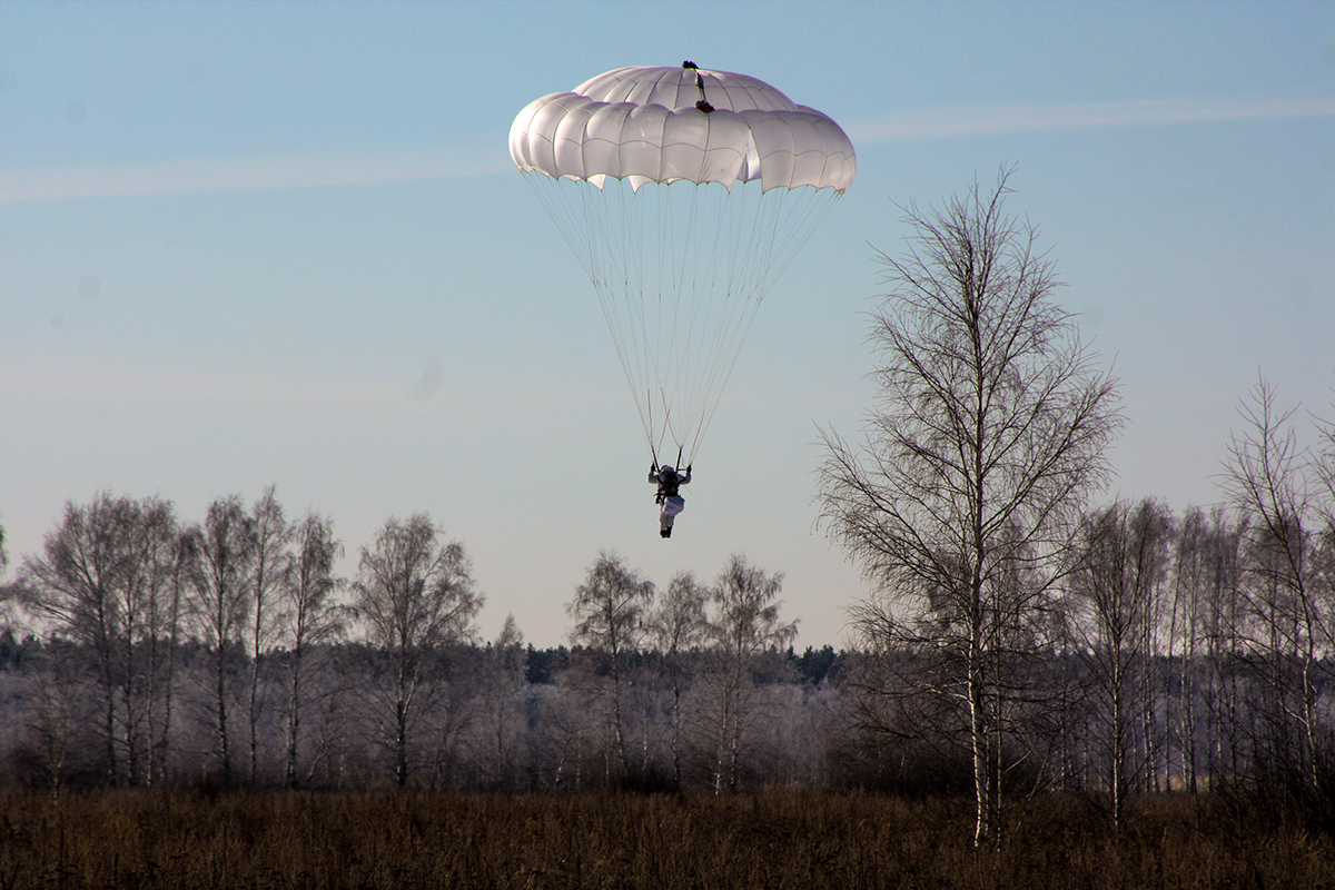 Практические прыжки с парашютом Д-10 бойцов 16-й обрспн в Тамбовской области.